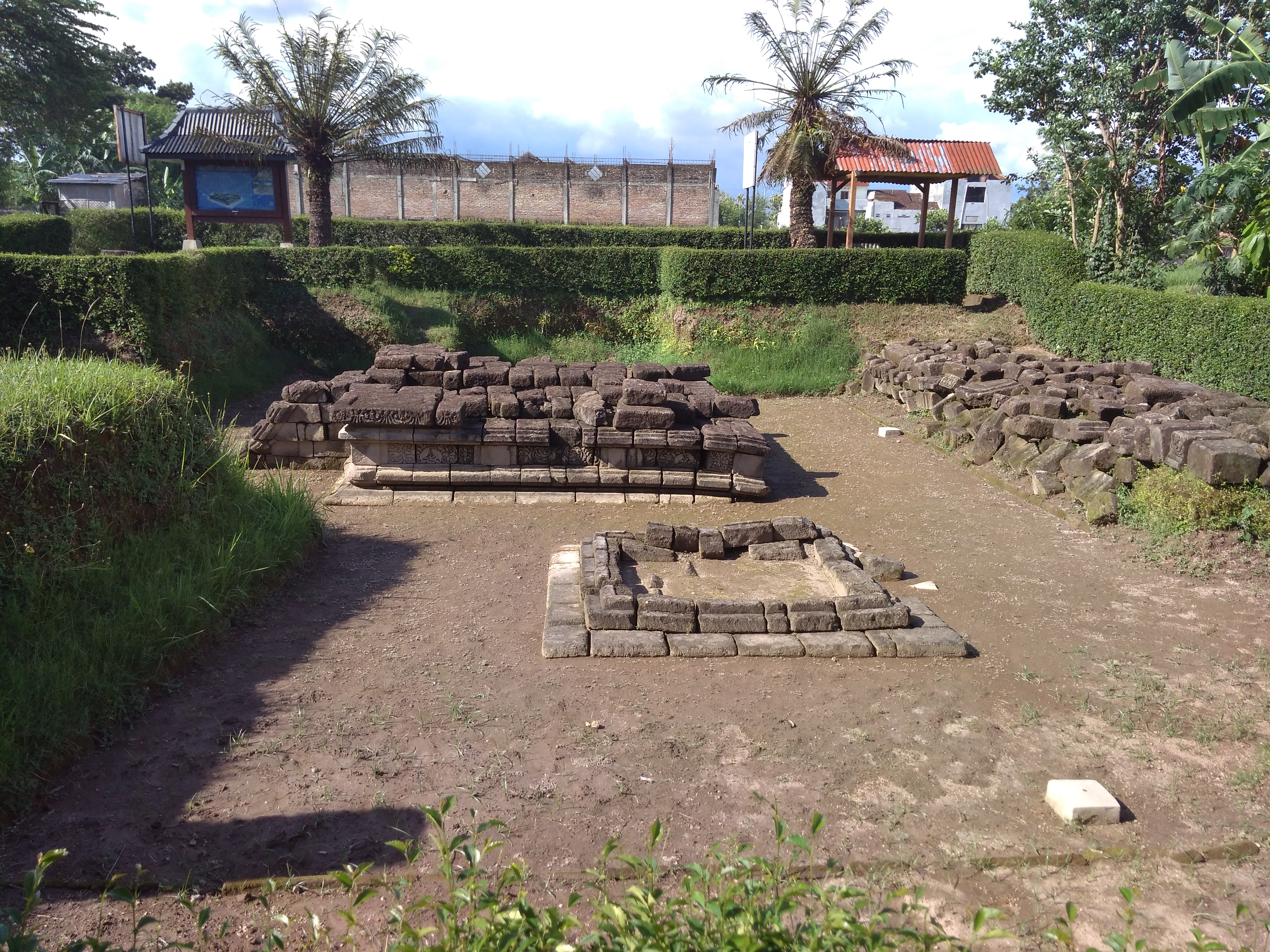 Candi Gampingan dari arah samping (selatan)